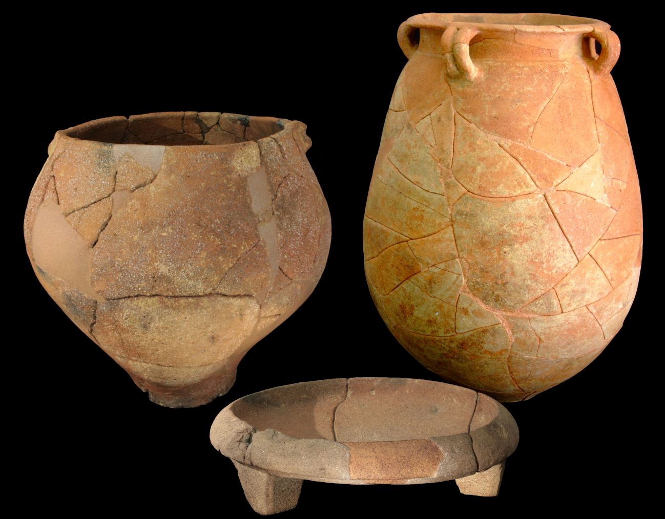 Cerámicas de los siglos VII-VI aC